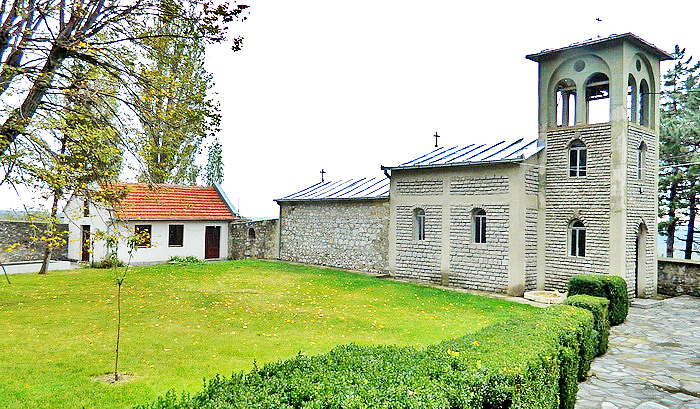 Церковь святителя Николая в монастыре Гориоч